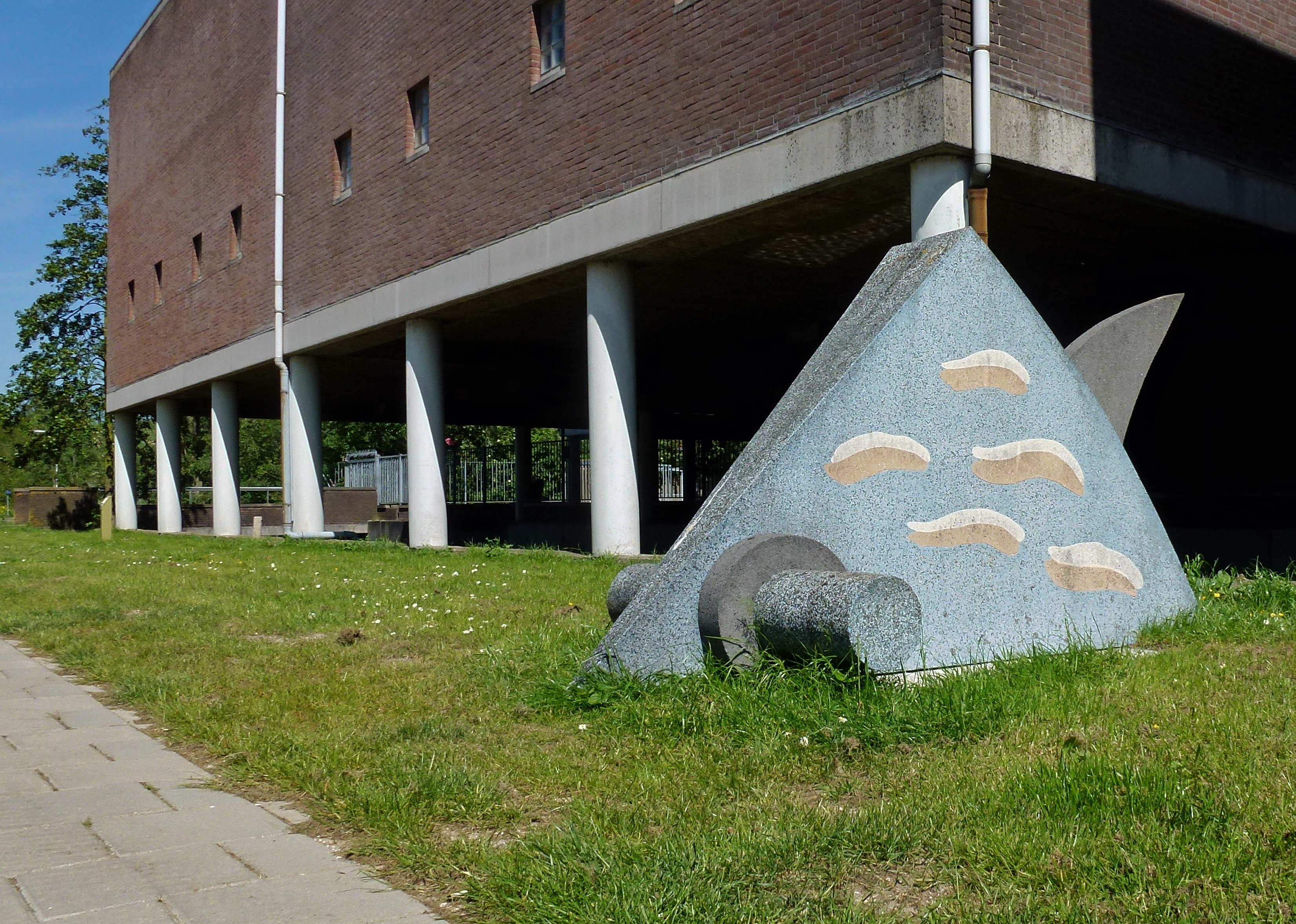 Kunstwerk van Pim Leefsma aan de H. J. Nederhorststraat. Geplaatst april 2015. Het werk stond eerst op een andere locatie.